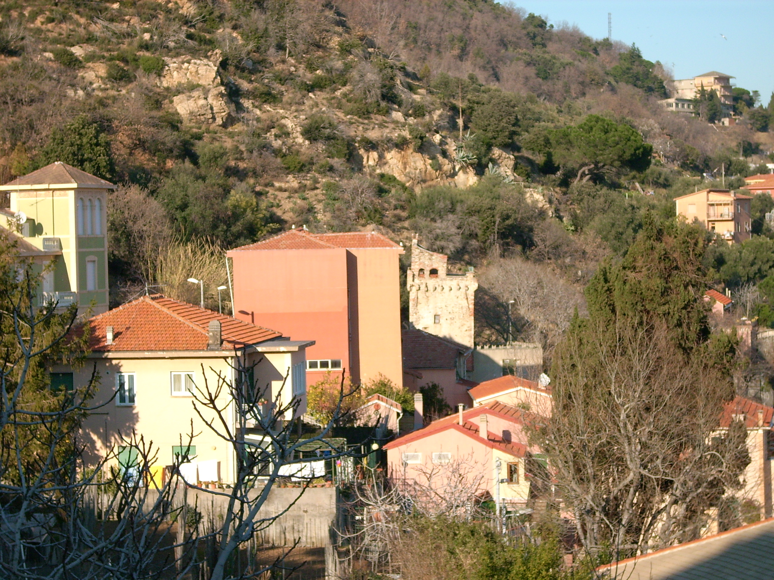 Bergeggi, Liguria, Italy